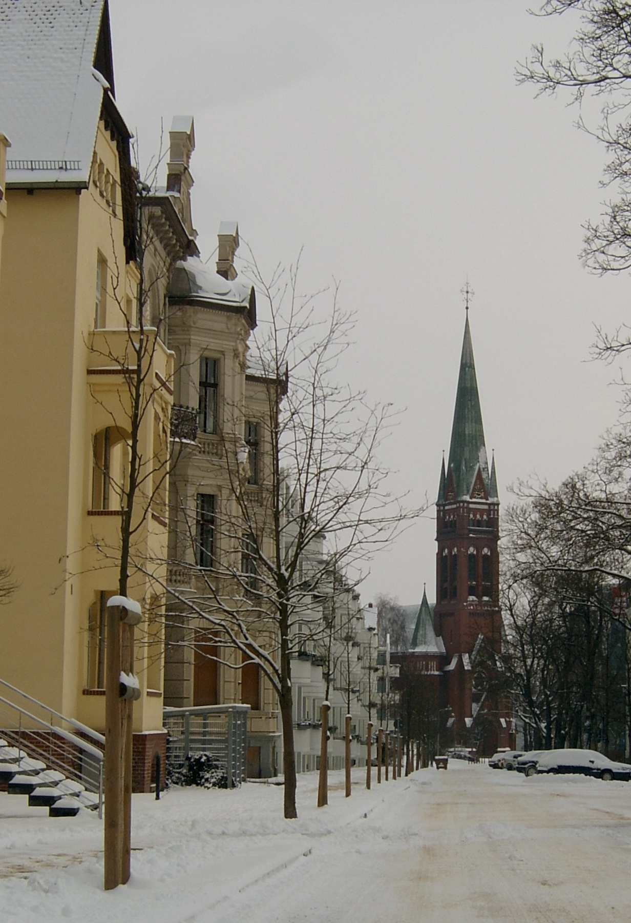 Die Heilig-Kreuz-Kirche in Frankfurt (Oder) von der Rudolf-Breitscheid-Straße aus Richtung Osten. - OpenStreetMap(Info)